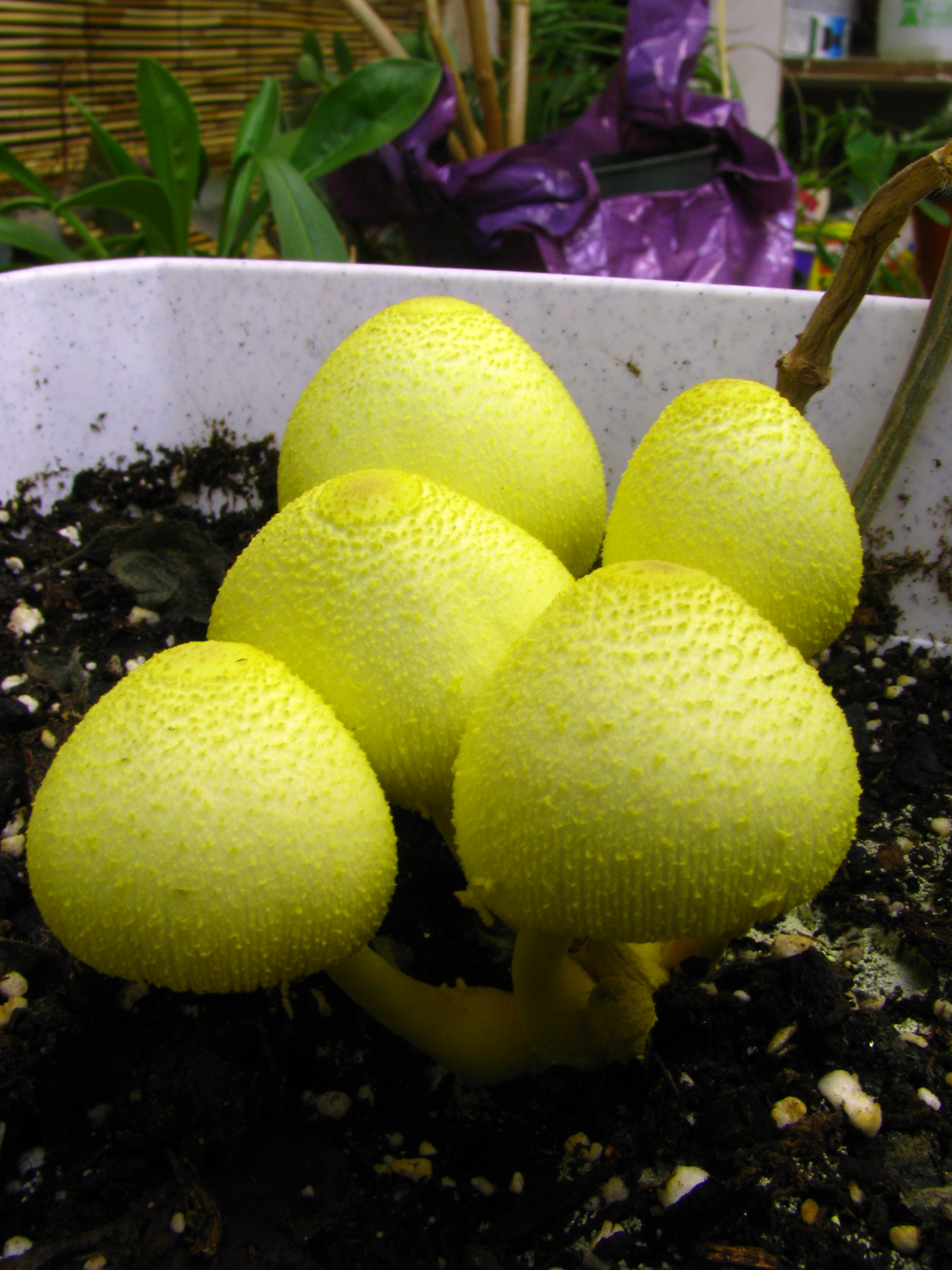 Leucocoprinus birnbaumii ((Corda) Singer) Location: Mozart, West Virginia, USA.